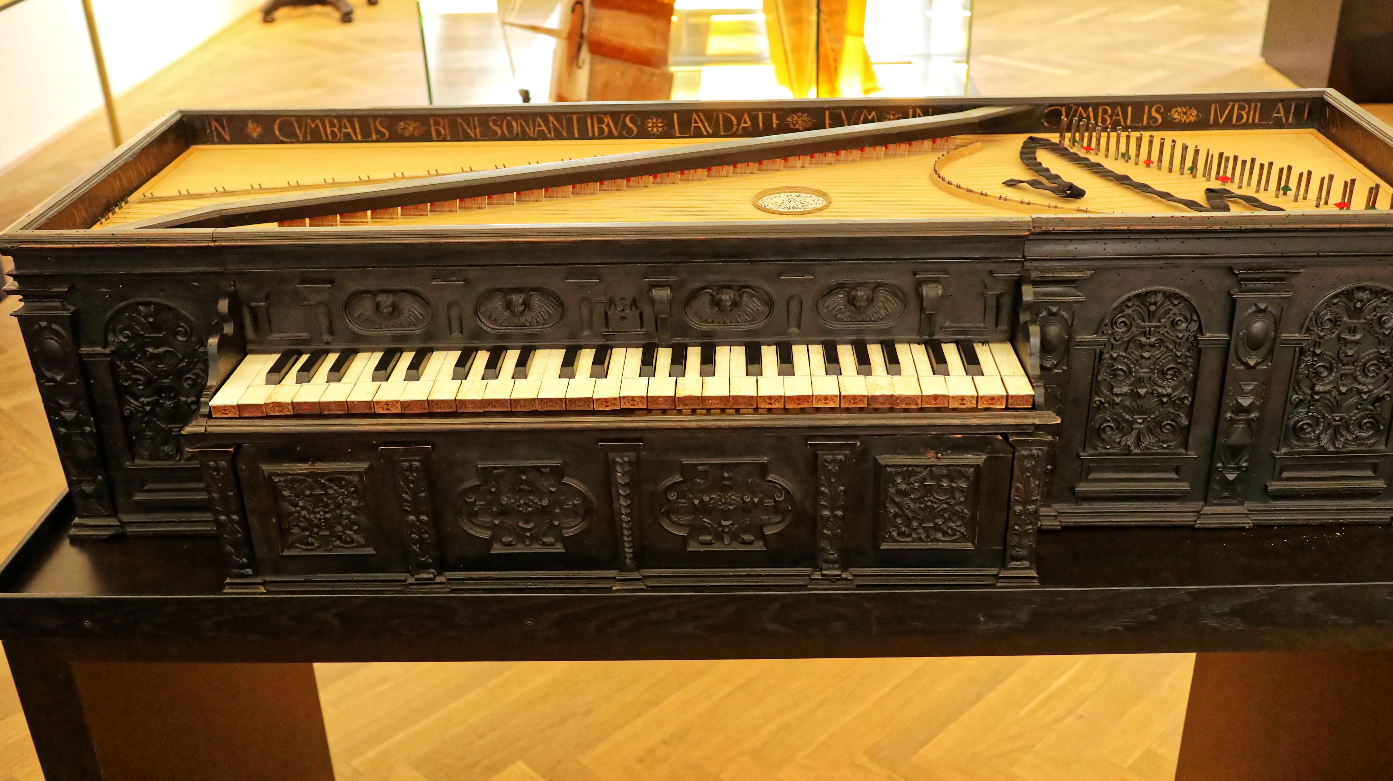 Wikipedianrinnen und Wikipedianer im Dommuseum. Im Mittelpunkt steht das Claviorganum. Claviorgana waren in der Renaissance, vor allem im ausgehenden 16. Jahrhundert, sehr beliebt. Funktionsfähig sind nur wenige geblieben, das wohl älteste noch spielbare Instrument ist das Claviorganum des Josua Pock, „Orgelmacher(s) zu Insprug“, aus dem Jahr 1591. Es ist das einzige Musikinstrument, das sich laut den Inventaren aus der Regierungszeit von Fürsterzbischof Wolf Dietrichs von Raitenau (1587-1612) in der Salzburger Residenz befunden hat.